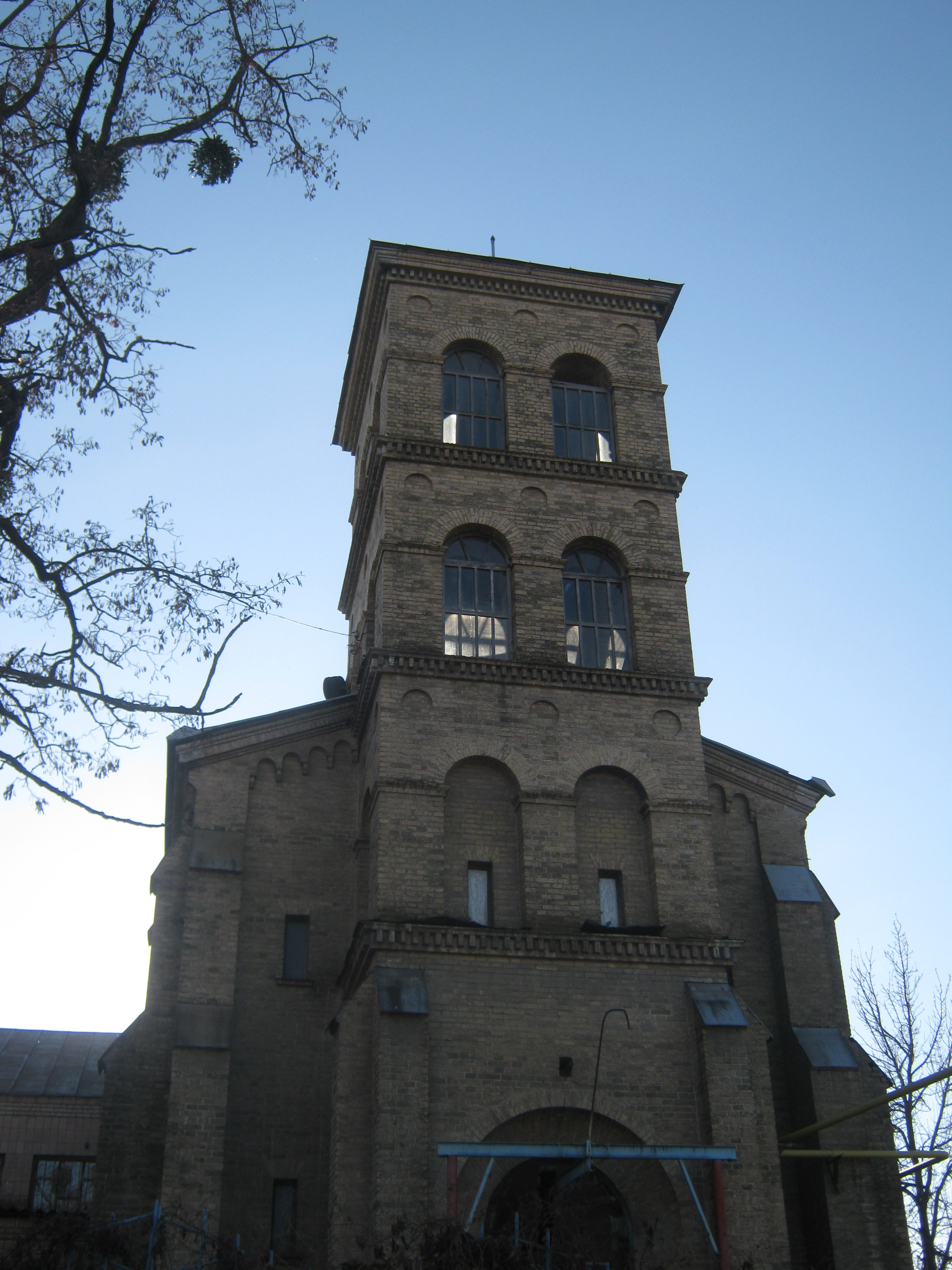 Костел у селищі Мошни (Черкаська область, Україна), побудований у 1857 році